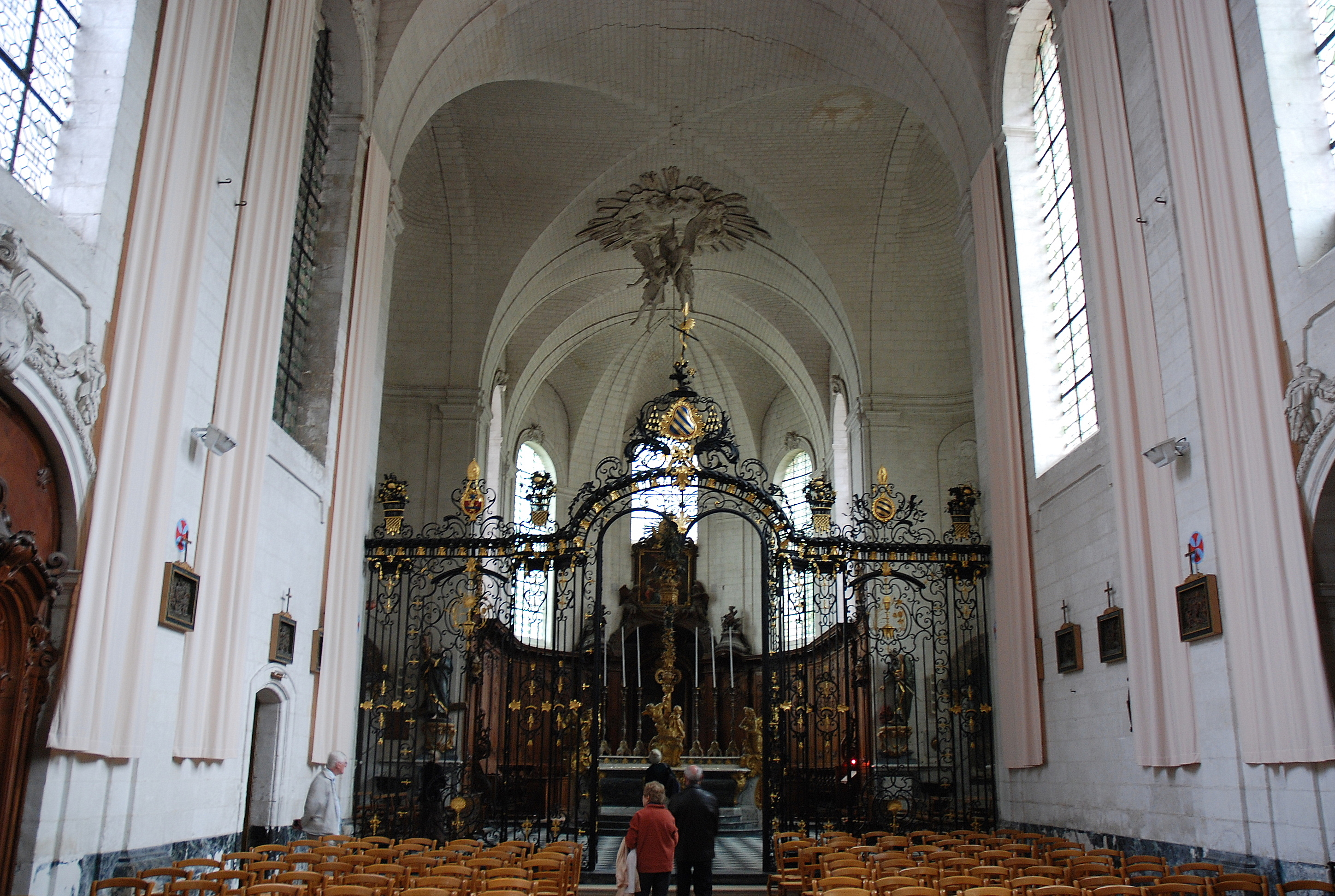 De abdijkerk van de abdij van Valloires, Frankrijk